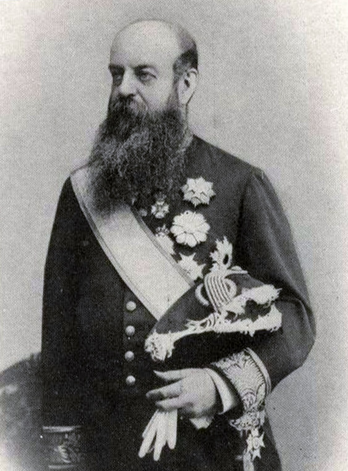 Joseph de Riquet de Caraman-Chimay, né le 9 octobre 1836 et décédé le 29 mars 1892, est un diplomate belge. Il est ministre des Affaires étrangères de Belgique de 1884 à 1892.